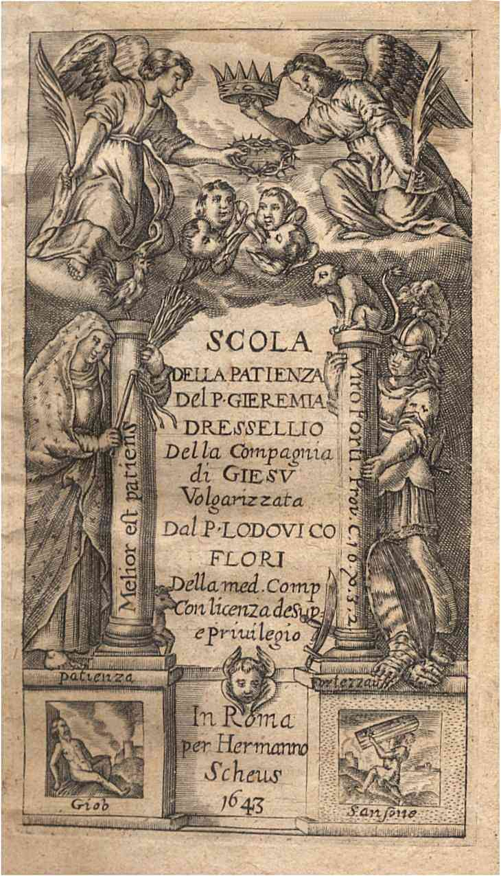 Frontespizio del libro Scola della Patienza del P. Gieremia Dressellio della Compagnia di Giesù volgarizzata dal P. Lodovico Flori della med. Comp. con licenza de Sup. e privilegio in Roma per Hermanno Scheus 1643